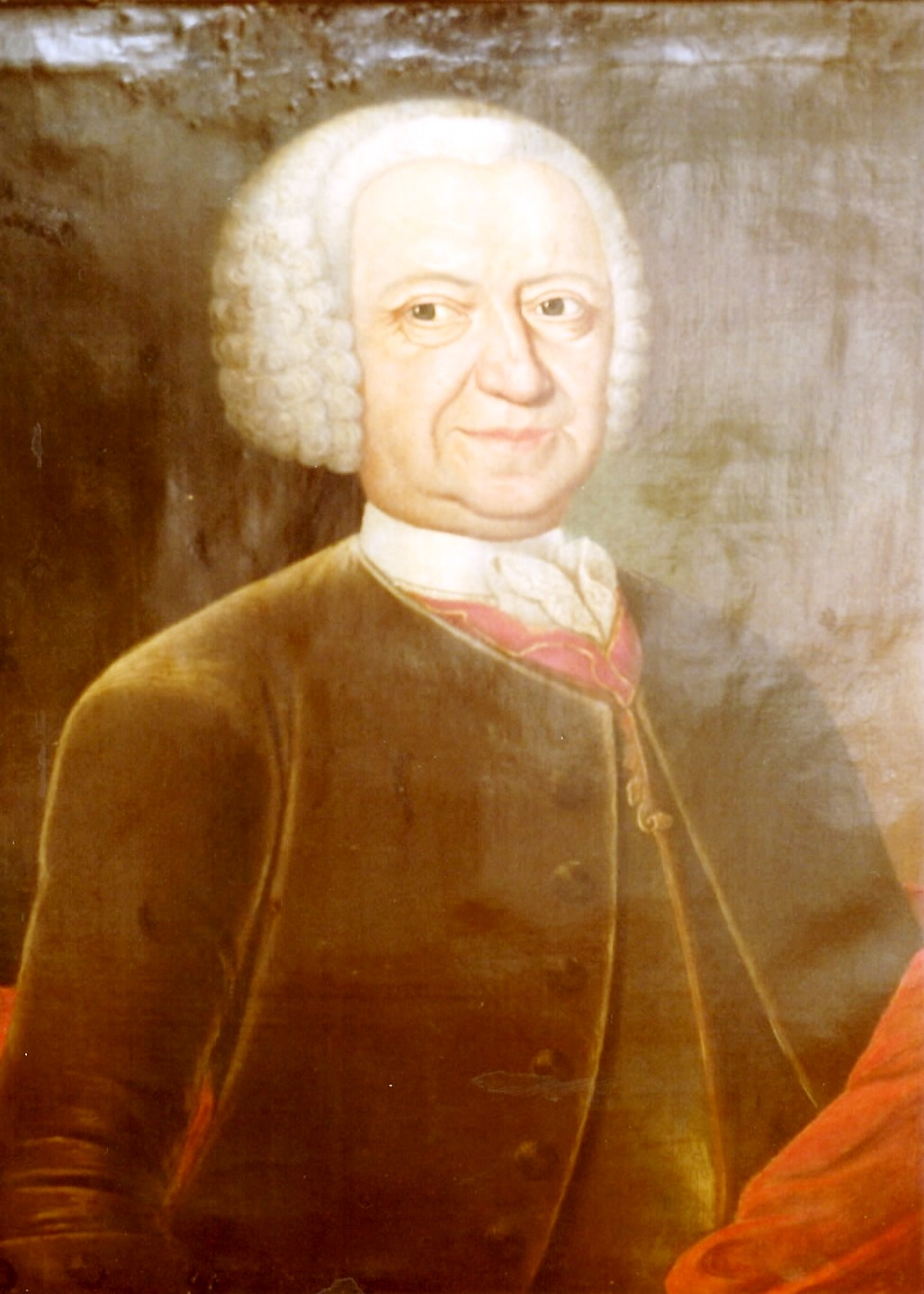 Christoph Otto von Gamm, Maler unbekannt. Privatbesitz Familie v. Gamm